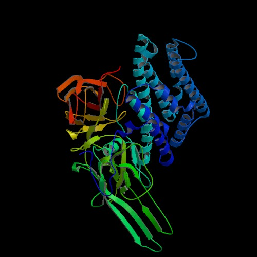 Bt-Toxin Cry2Aa. In blau die Domain I mit den Alpha-Helices, grün Domain II, rot Domain III. Das Bild wurde der Protein Database entnommen. Es ist Public Domain PDB ID: 1I5P. erstmals erwähnt in: Morse, R. J., Stroud, R. M., Yamamoto, T.: Structure of Cry2Aa Suggests an Unexpected Receptor-Binding Epitope Structure 9 pp. 409 (2001)